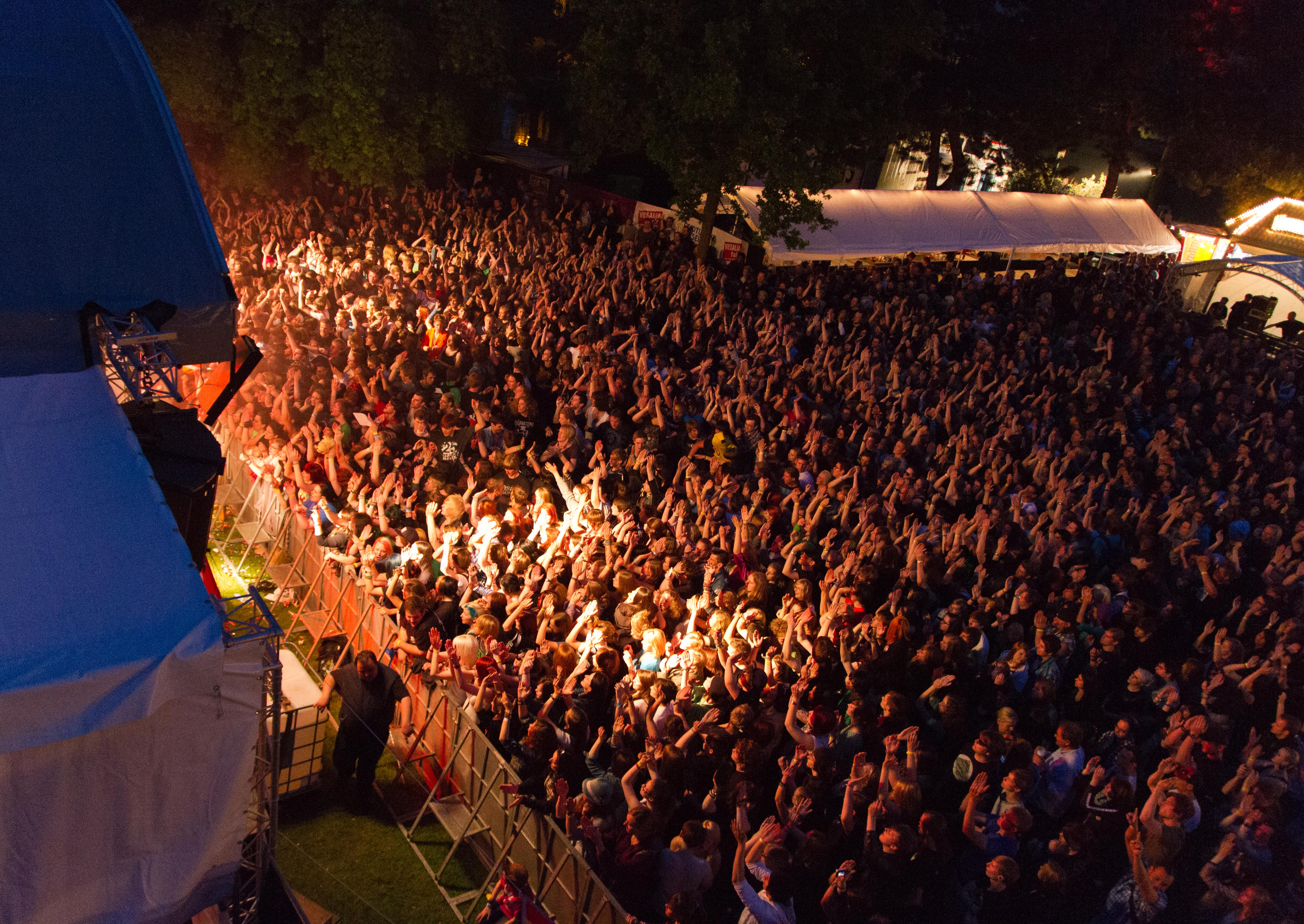 Blick auf die Hauptbühne EselRock 2012